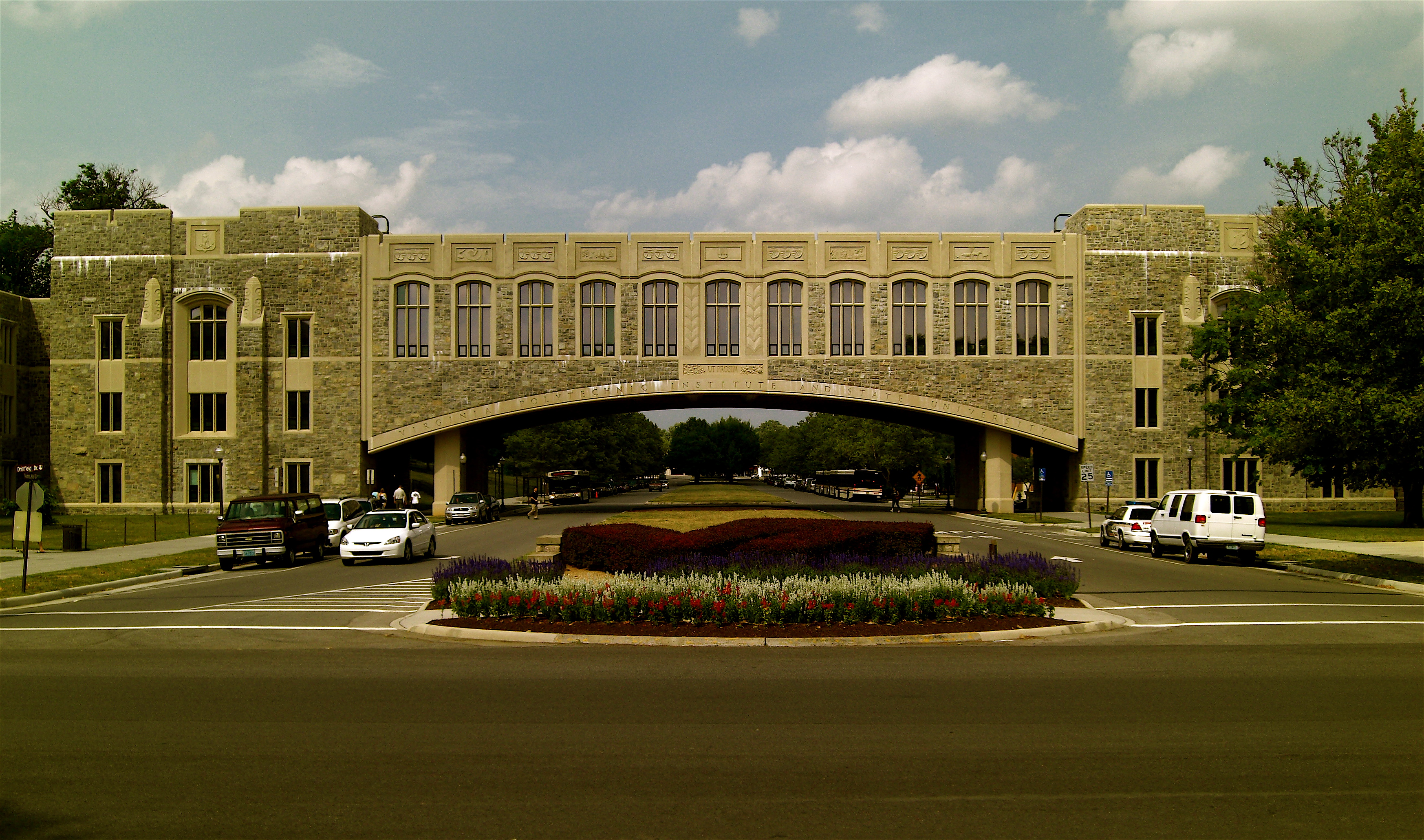 Torg Bridge at VT